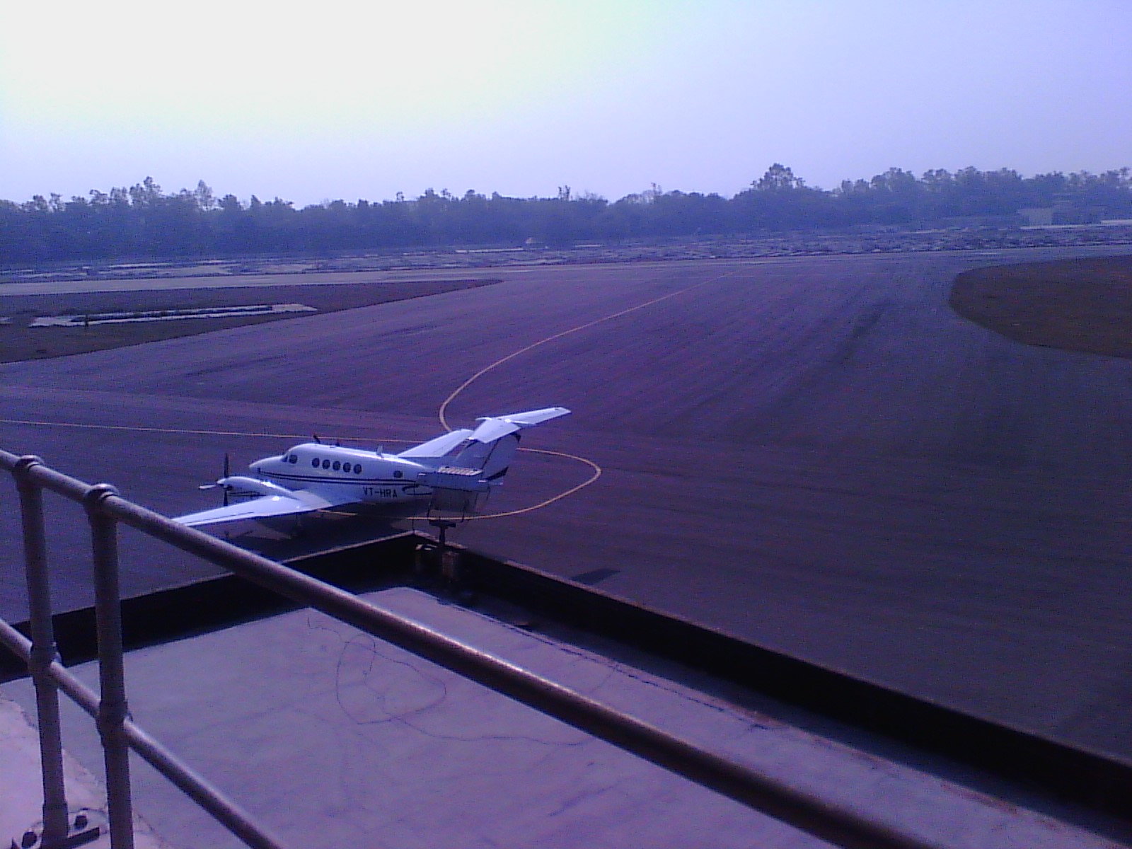 सफ़दरजंग विमानक्षेत्र पर एक विमान